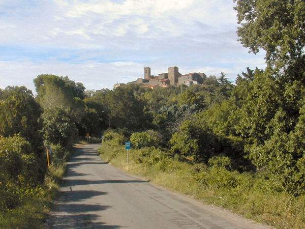 Autore: Utente:Trapanator; Fonte: Utente:Trapanator, foto amatoriale fatta da me il 22 agosto 2005; Descrizione: Panorama su Vetulonia